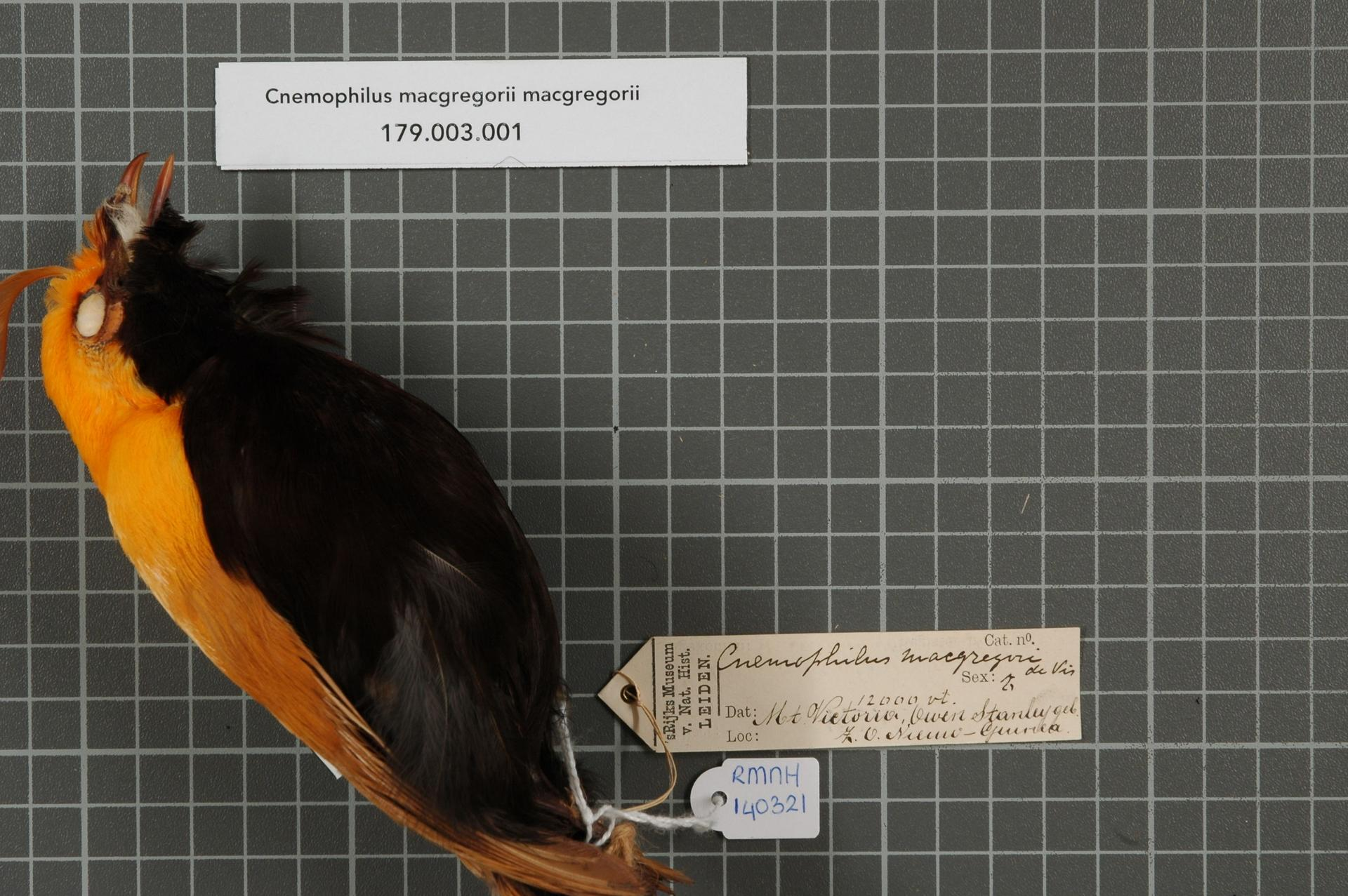 Cnemophilus macgregorii macgregorii De Vis, 1890